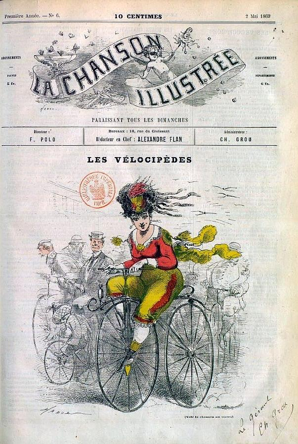 La Chanson Illustrée, 'Le vélocipède', 2 mai 1869 (illustration d'Hador - bibliothèque impériale).